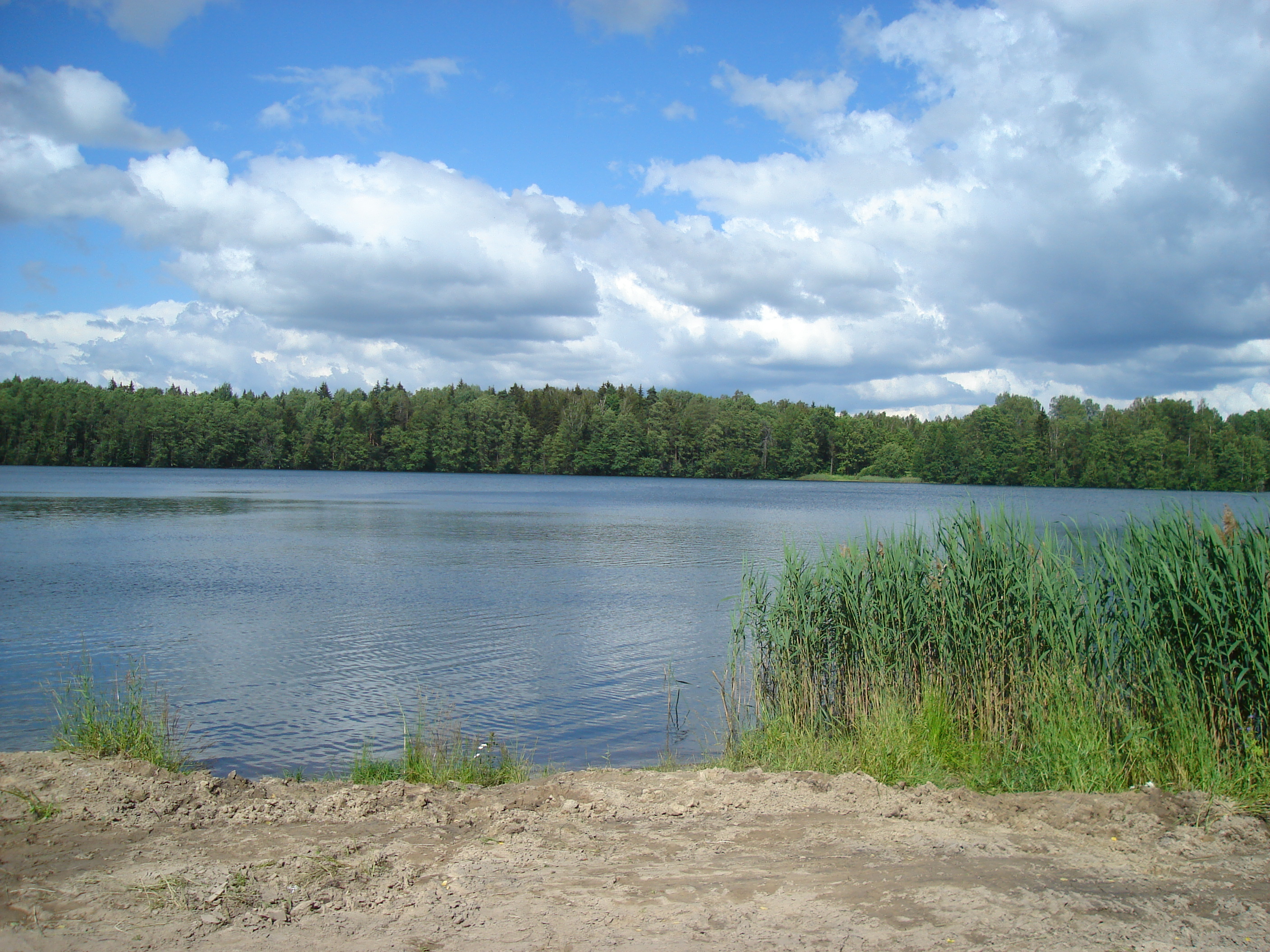 Святое озеро, Жуковский район This image is related to the protected area of Russia number 3210077